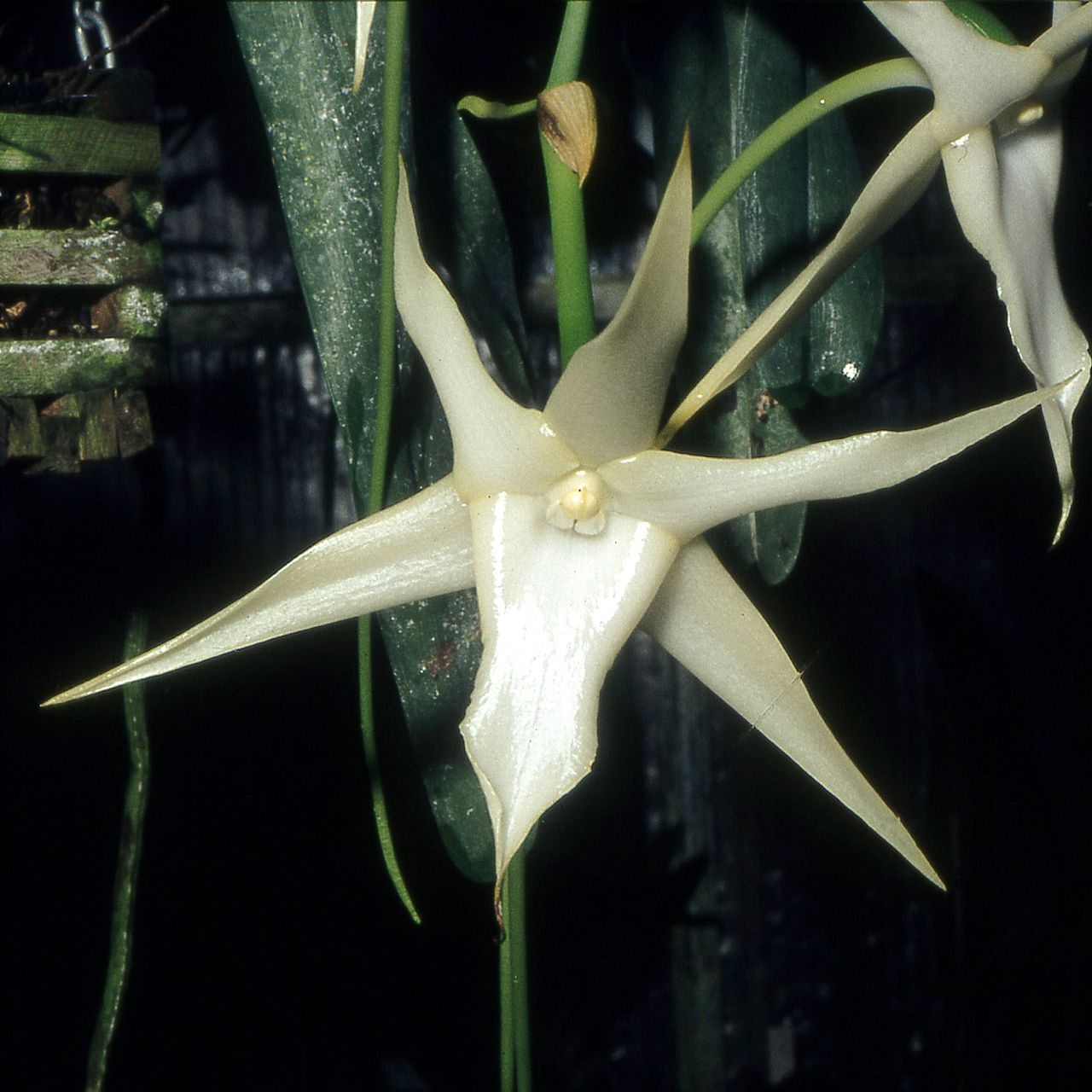 Angraecum sesquipedale - flowers